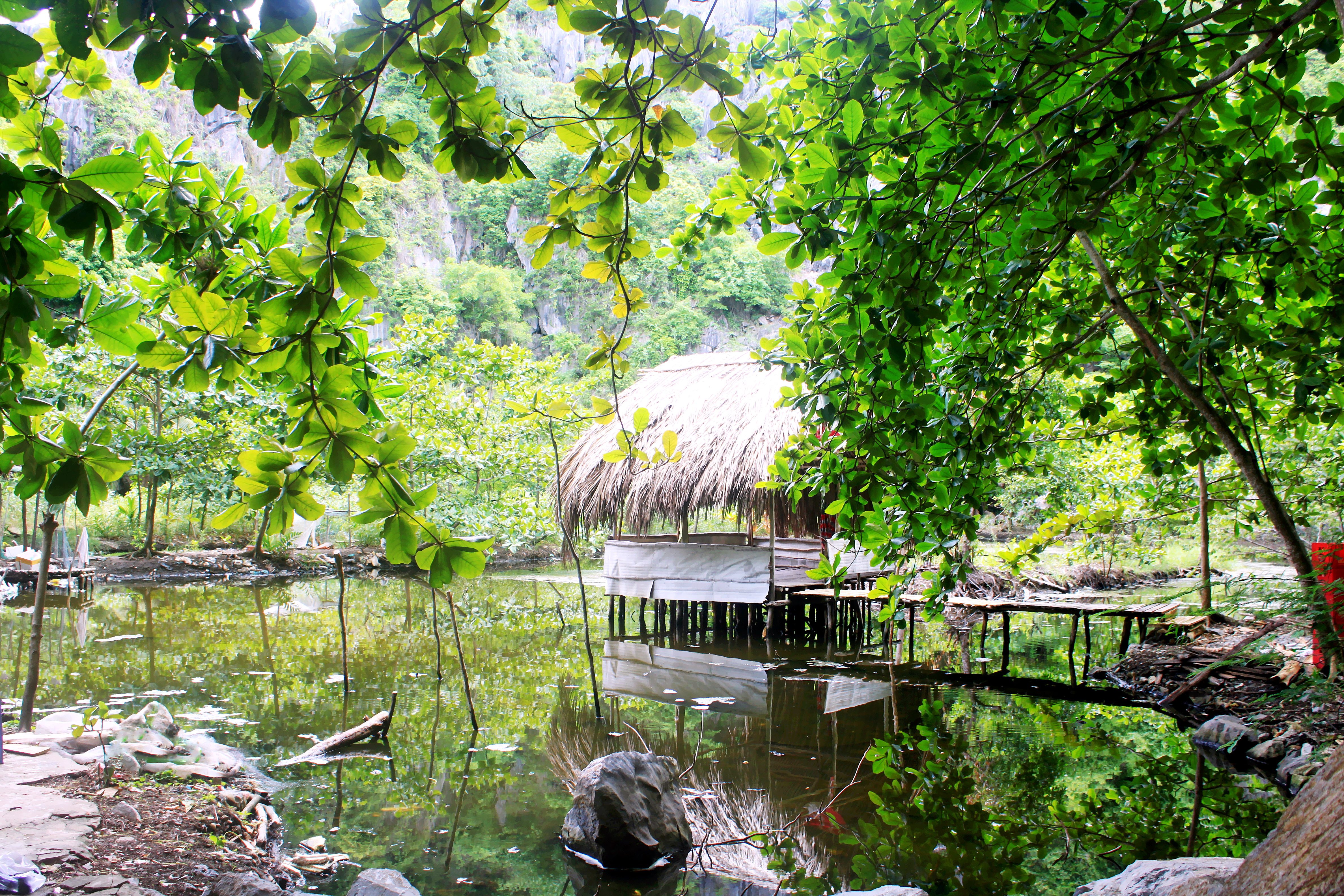 Một thung lũng nhỏ ở giữa núi Mo So, thuộc Kiên Lương, Kiên Giang, Việt Nam.